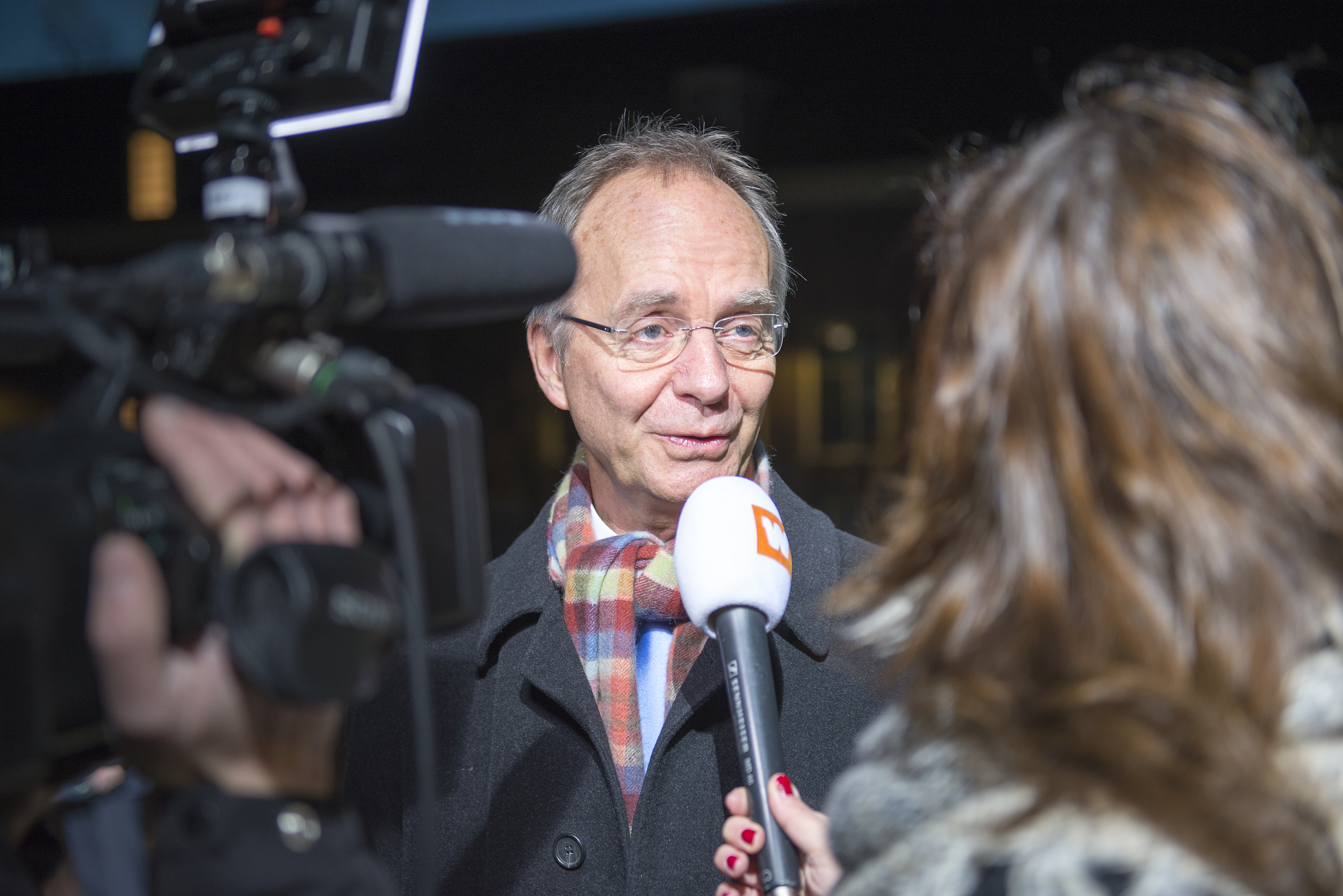 Foto BZ | Aad Meijer